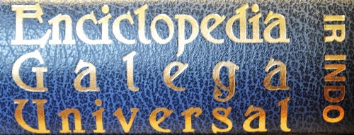 Detalle do lombo dun volume da Enciclopedia Galega Universal da editorial Ir Indo